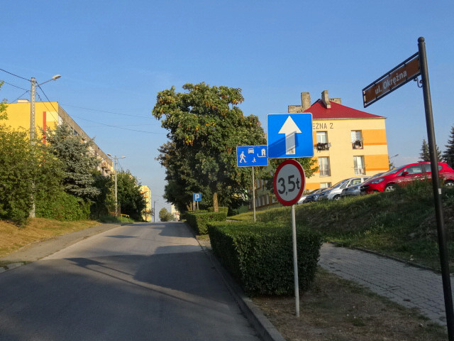 Piechcin, gm. Barcin, woj. kujawsko-pomorskie